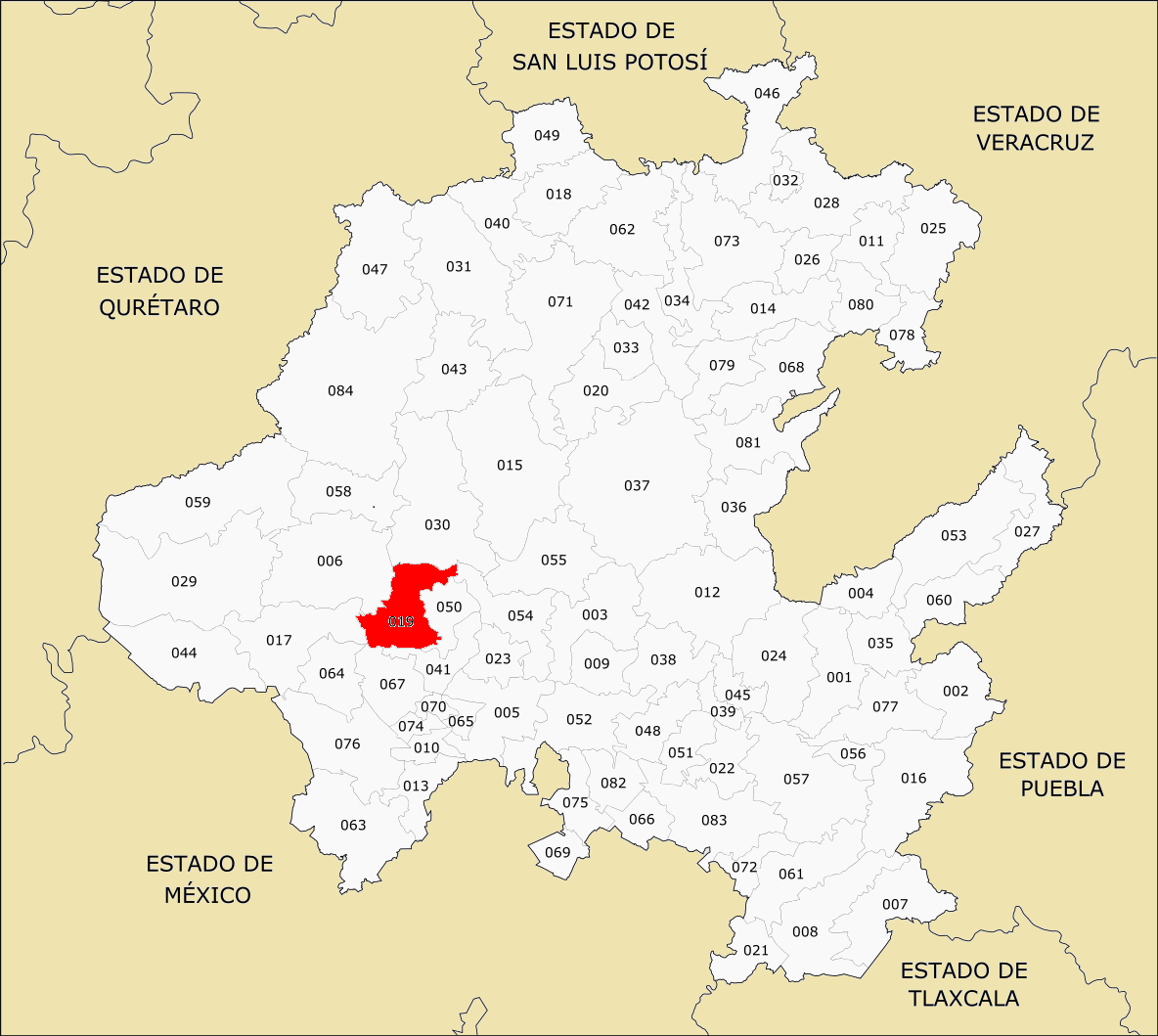 Municipio de Hidalgo